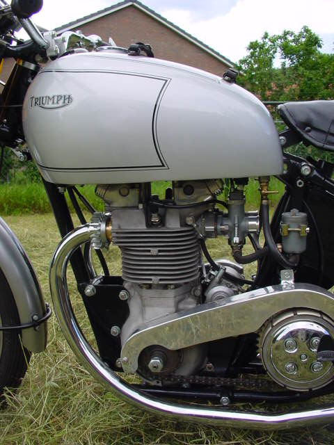 Pre unit: de primaire ketting drijft vanaf de krukas de koppeling en de versnellingsbak aan. Primaire aandrijving via een ketting op een Triumph motorfiets uit 1951.